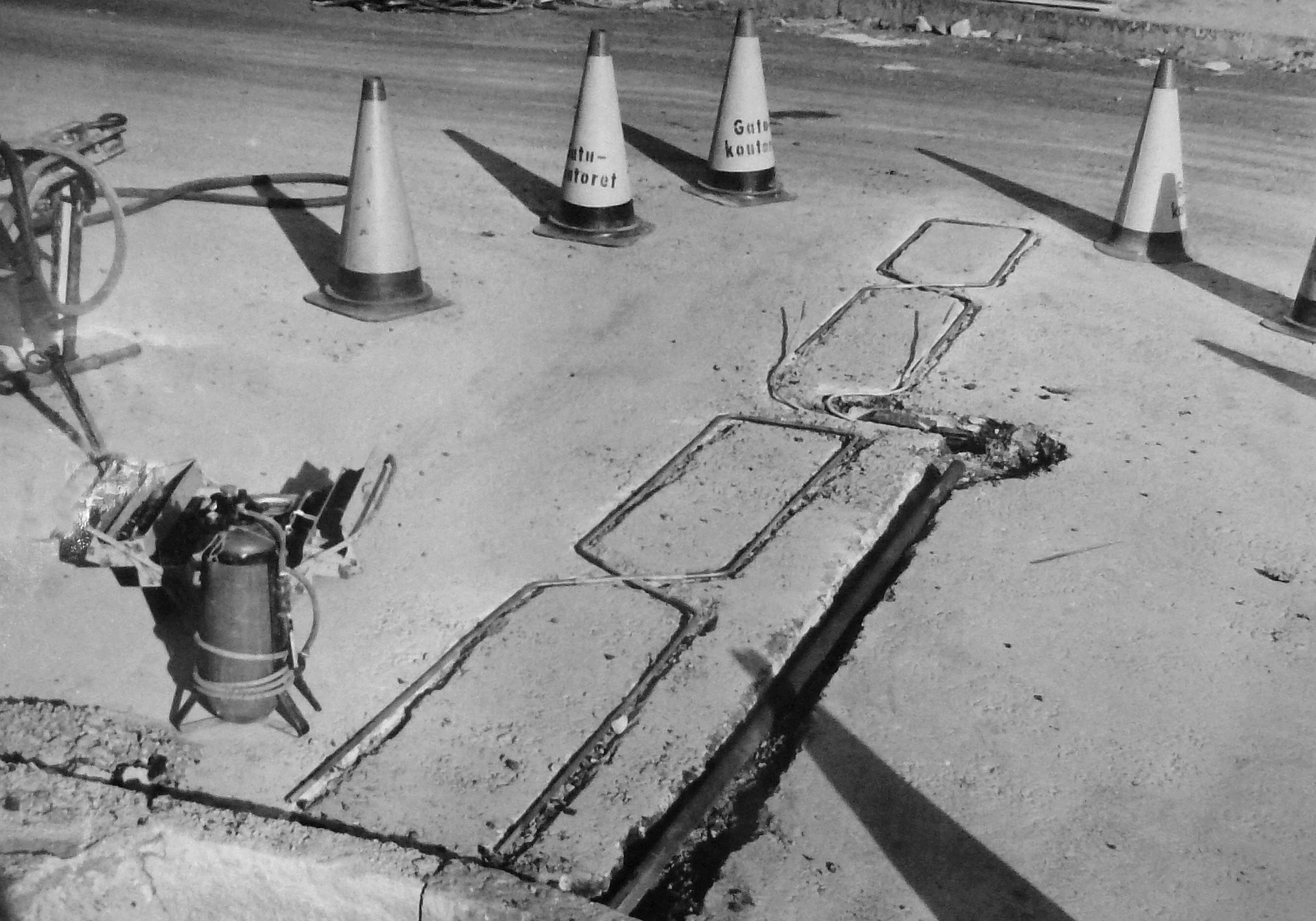 Nedläggning av detektorslingor för trafiksignalstyrning på Klarastrandsleden